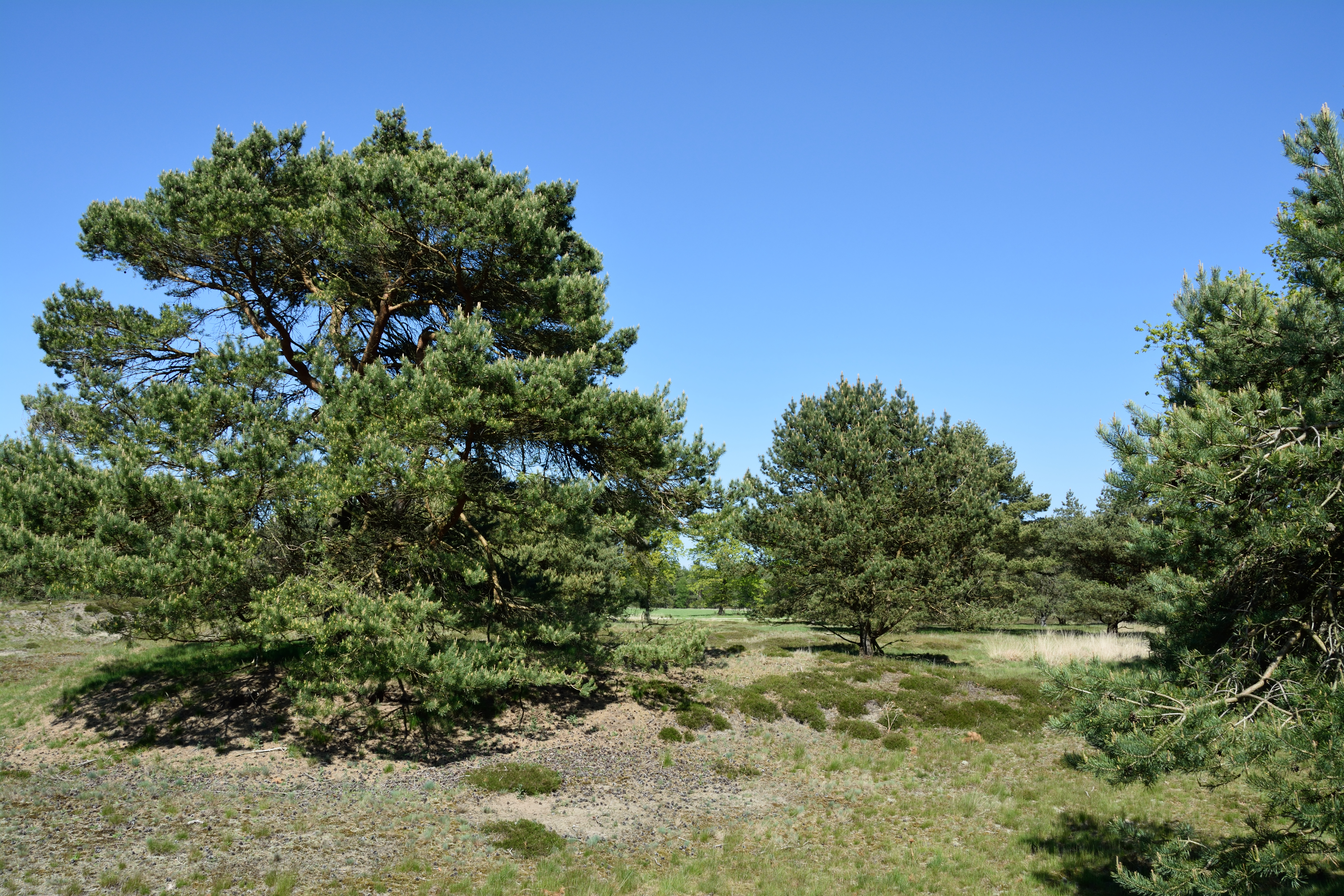 Naturschutzgebiet im Kreis Segeberg Impressionen aus dem Gebiet "Barker Heide"